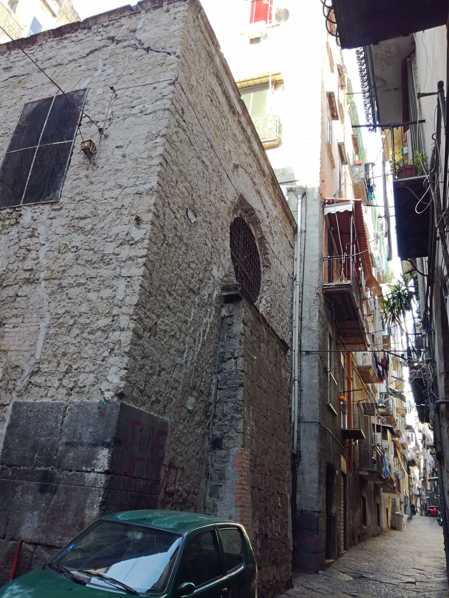 Chiesa di Santa Maria la Bruna al vicolo Scassacocchi (Napoli)